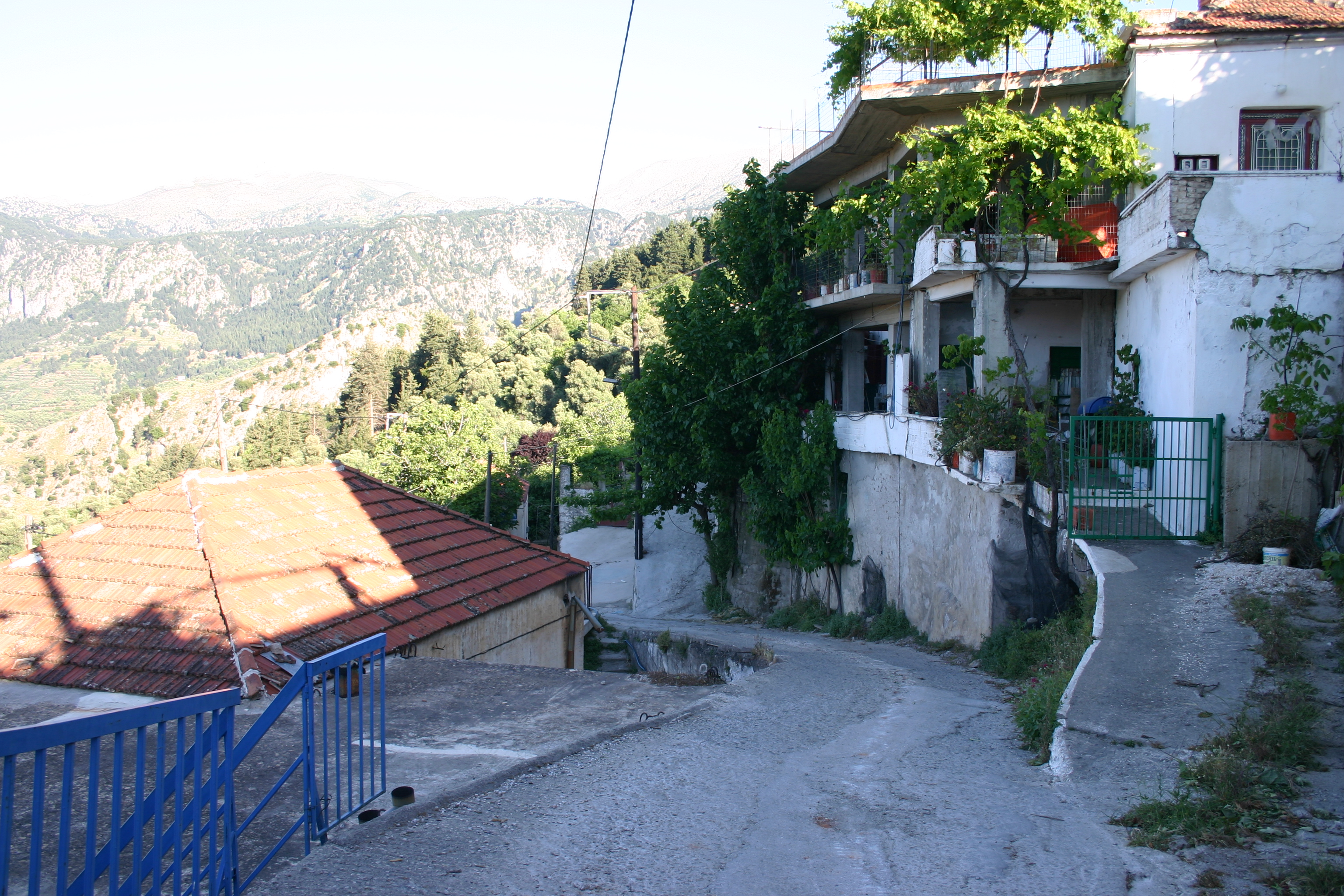 Street in Lakki, Crete